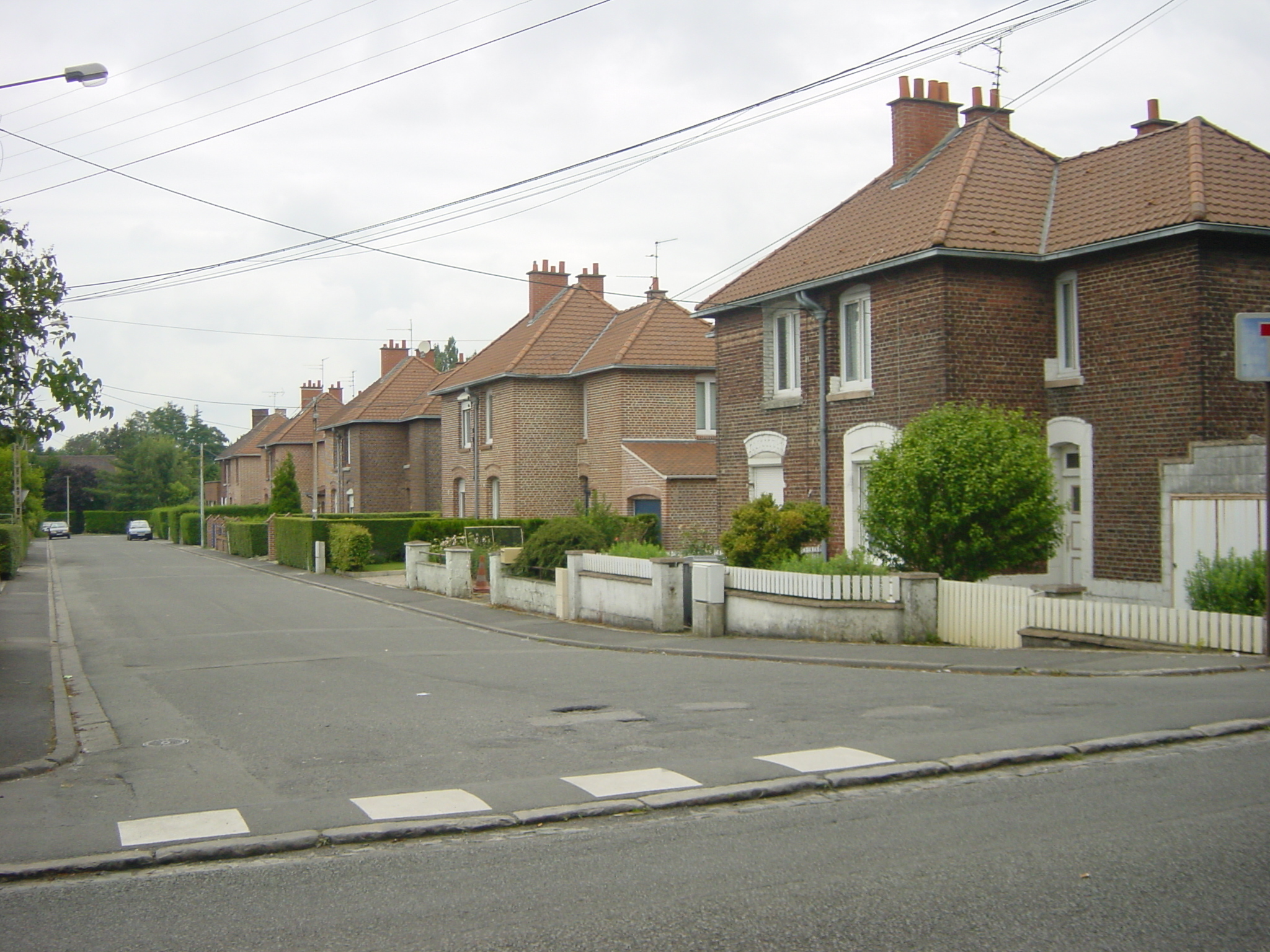 la cité de l'Union